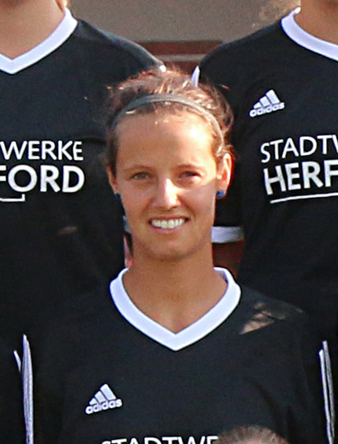 Herforder SV Borussia Friedenstal Team 2014/2015